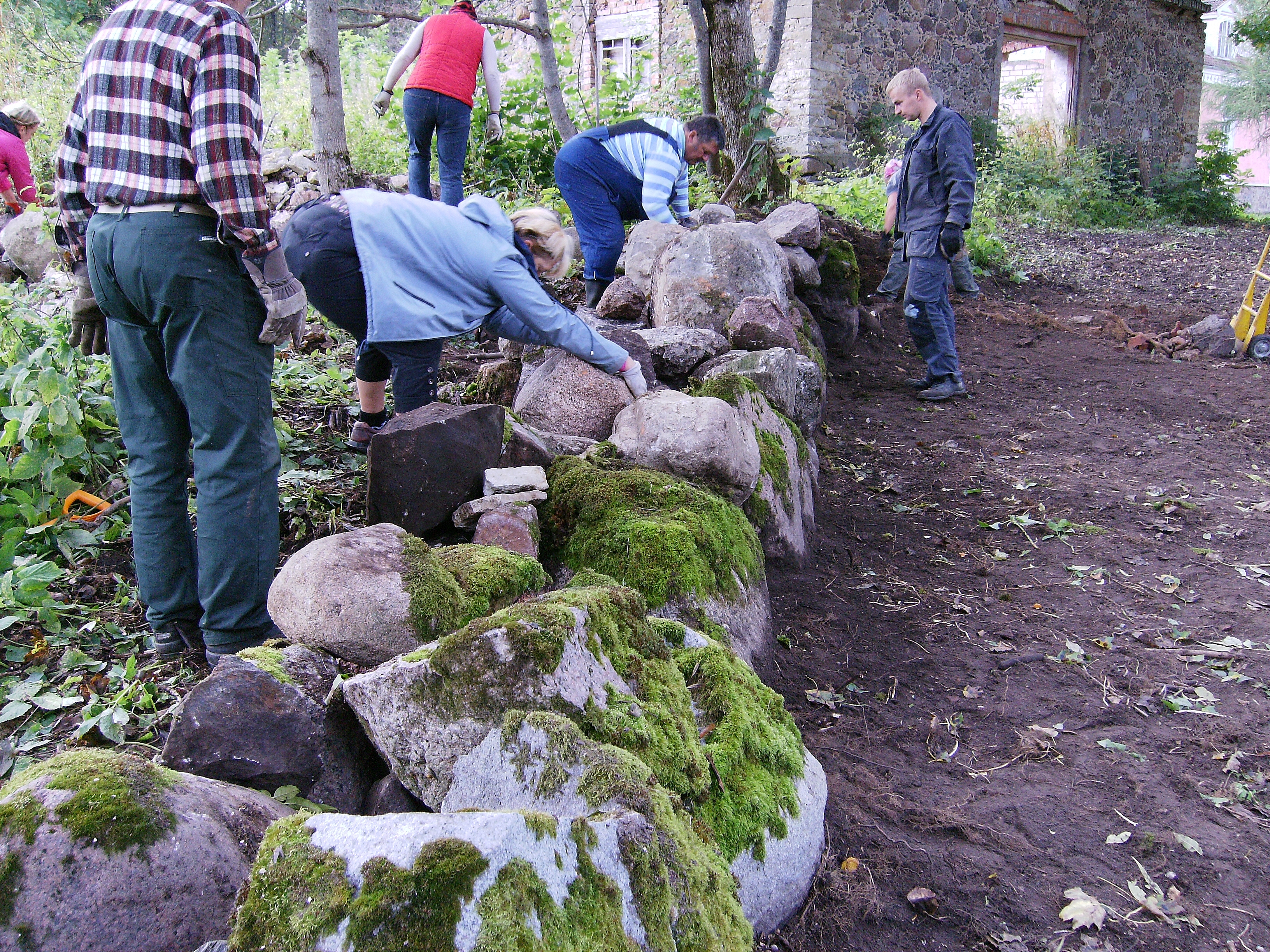 Kiviaia taastamise koolitus Kolu mõisas.